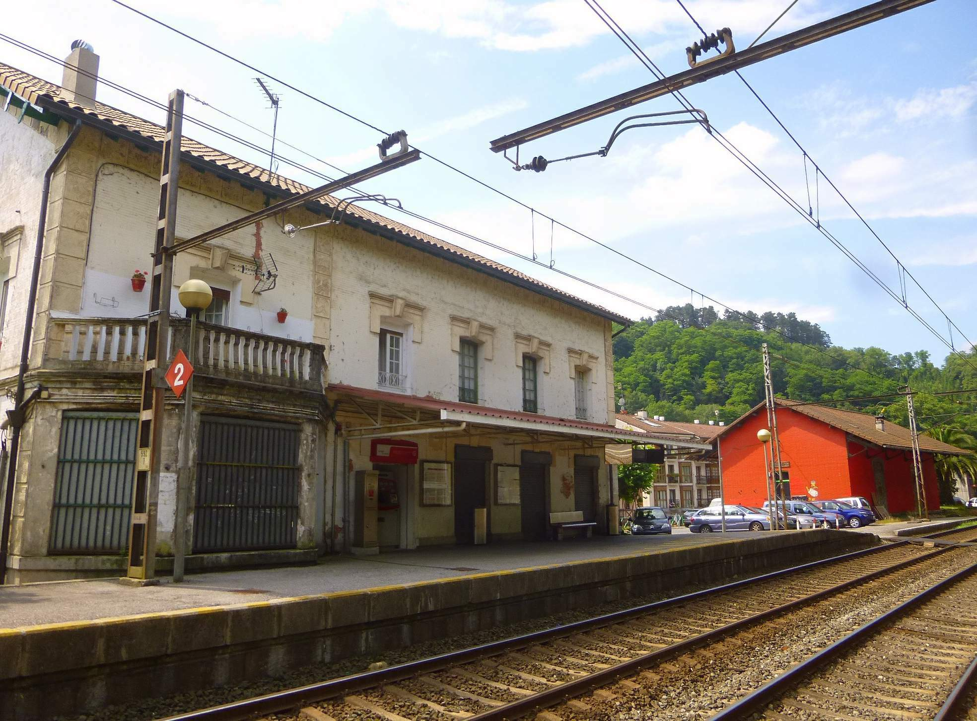 Alegia (Guipúzcoa) - Estación de Alegría de Oria